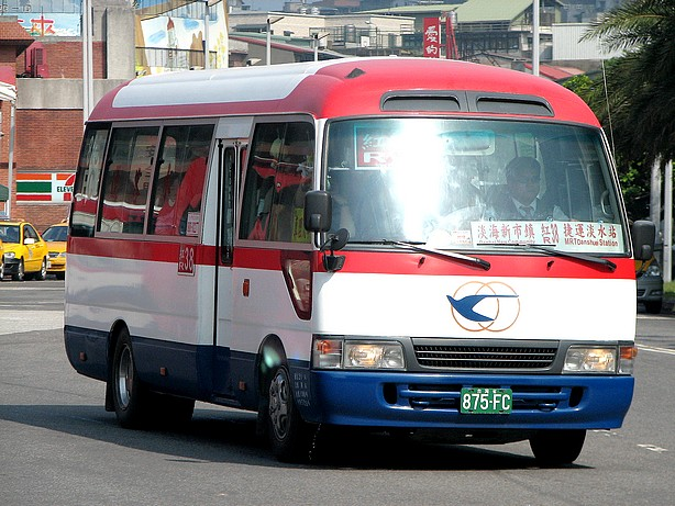 淡水客運豐田Coaster中型巴士875-FC，行駛紅38線。